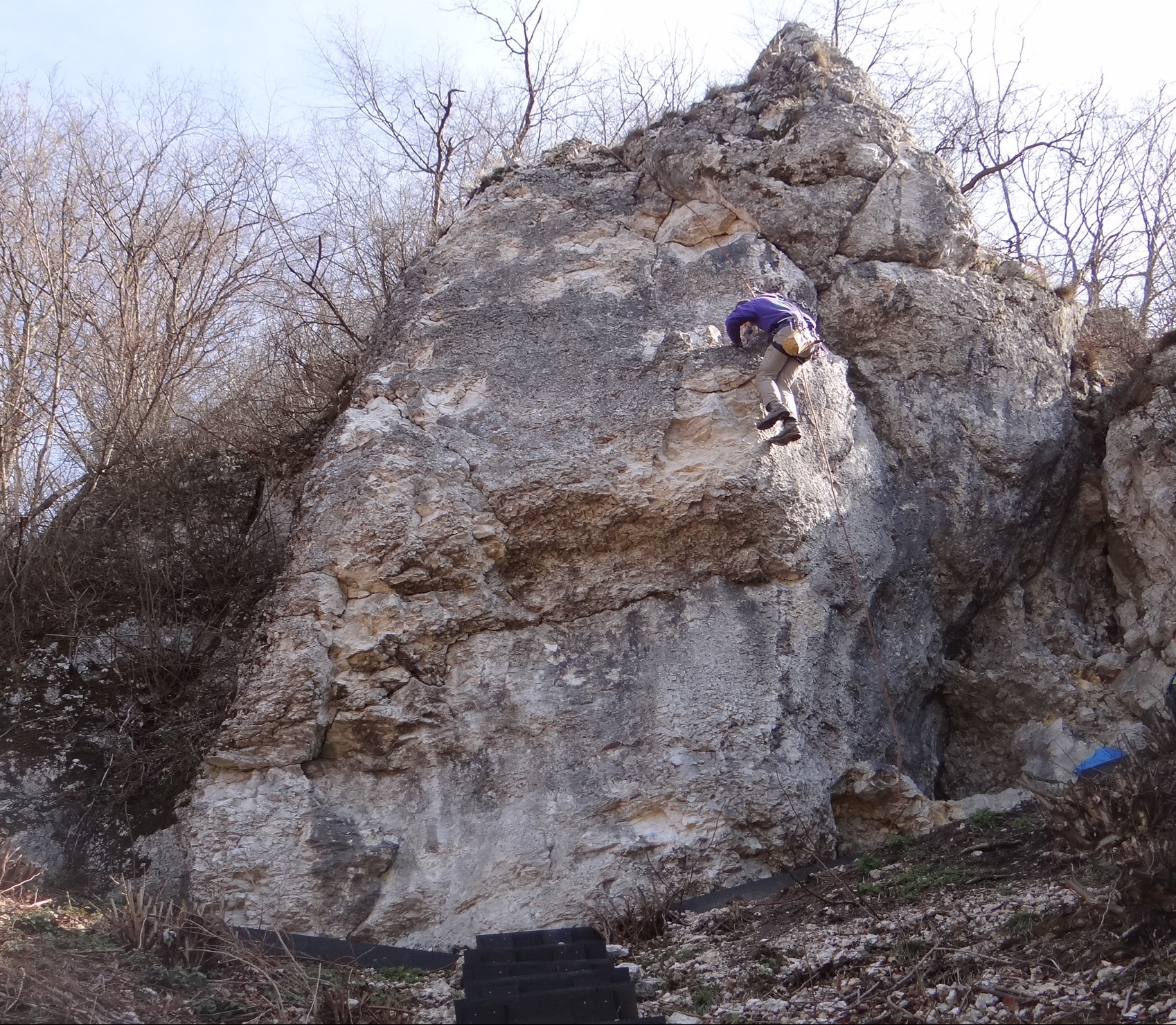 Skała Trybuna w Dubiu na wyżynie Olkuskiej